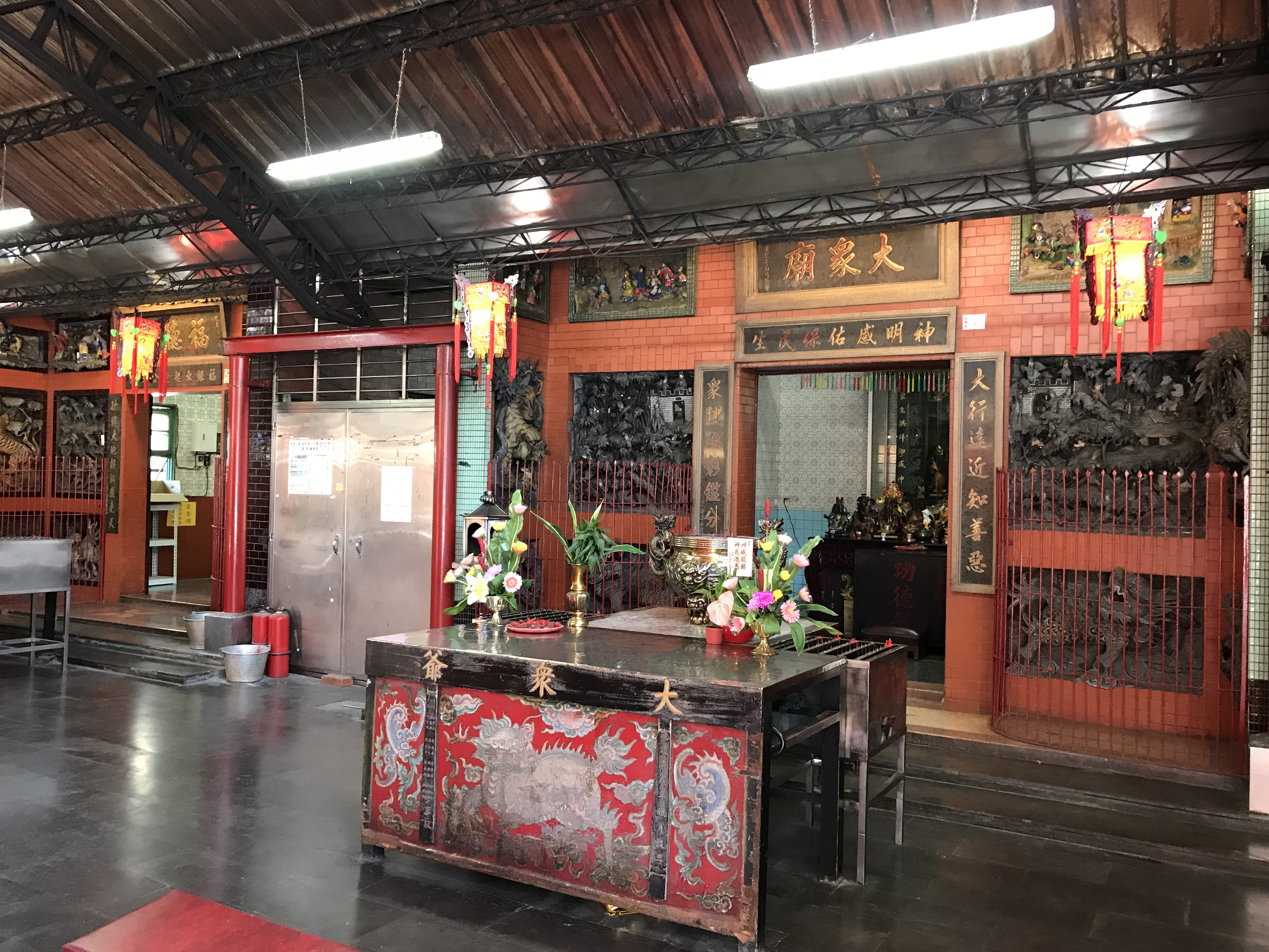 中文（台灣）: 板橋接雲寺旁的板橋大眾廟與板橋西門福德宮